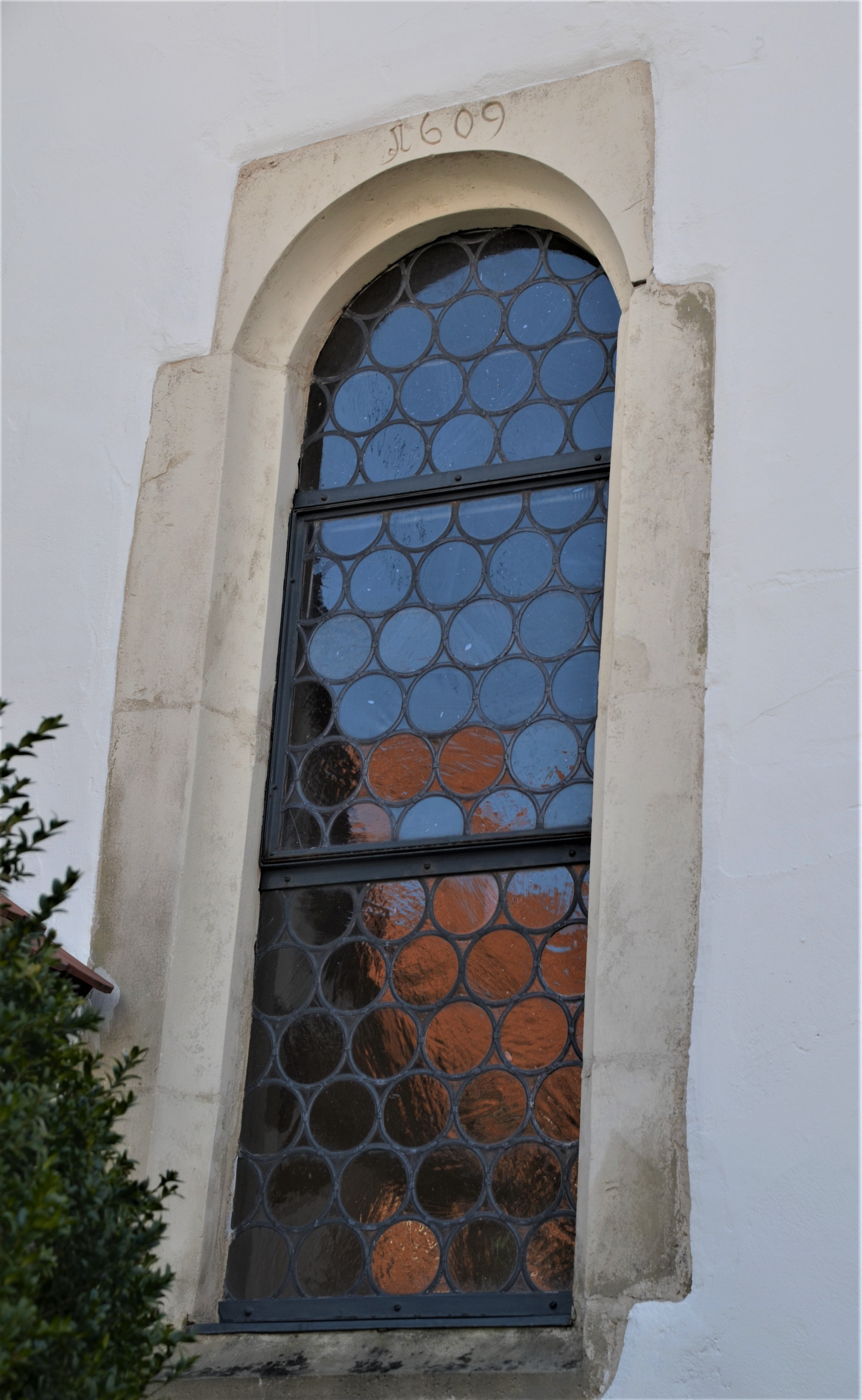 Fenster an der Nordfassade der St. Coloman Kirche in Schwäbisch Gmünd-Wetzgau mit der Jahreszahl 1609, Jahre der Instandsetzung und Erweiterung